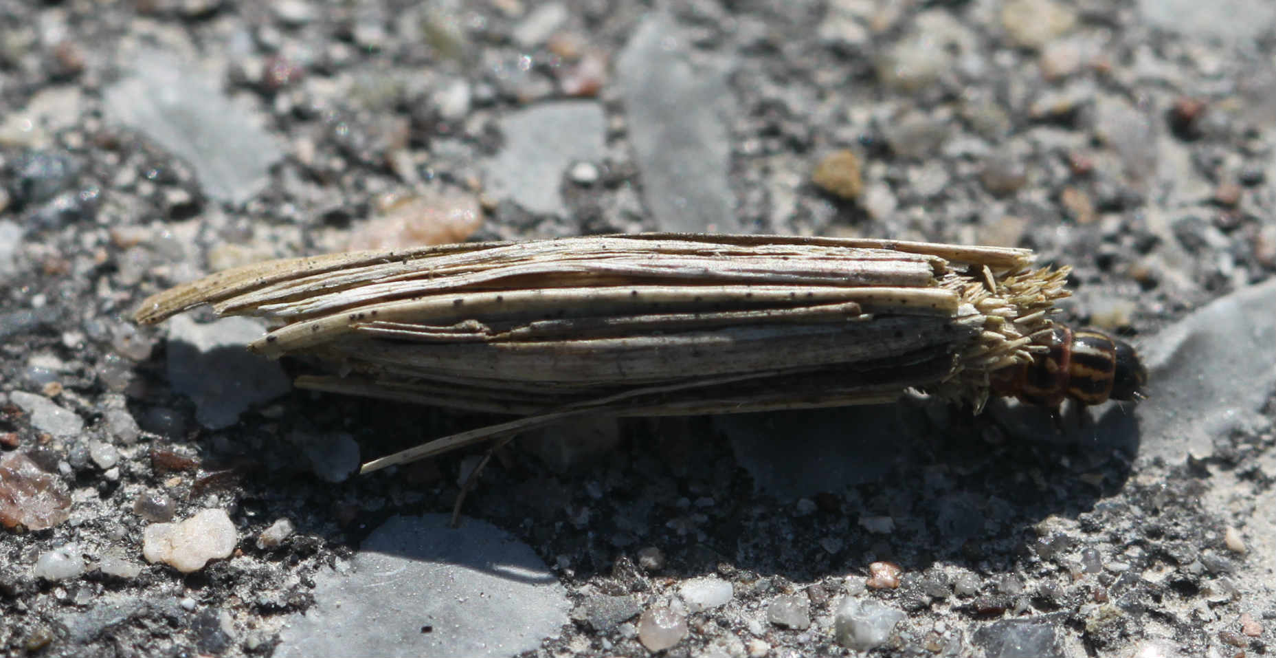 Kleiner Rauch-Sackträger (Psyche casta) am 11.4.2017 in Walldorf/Baden